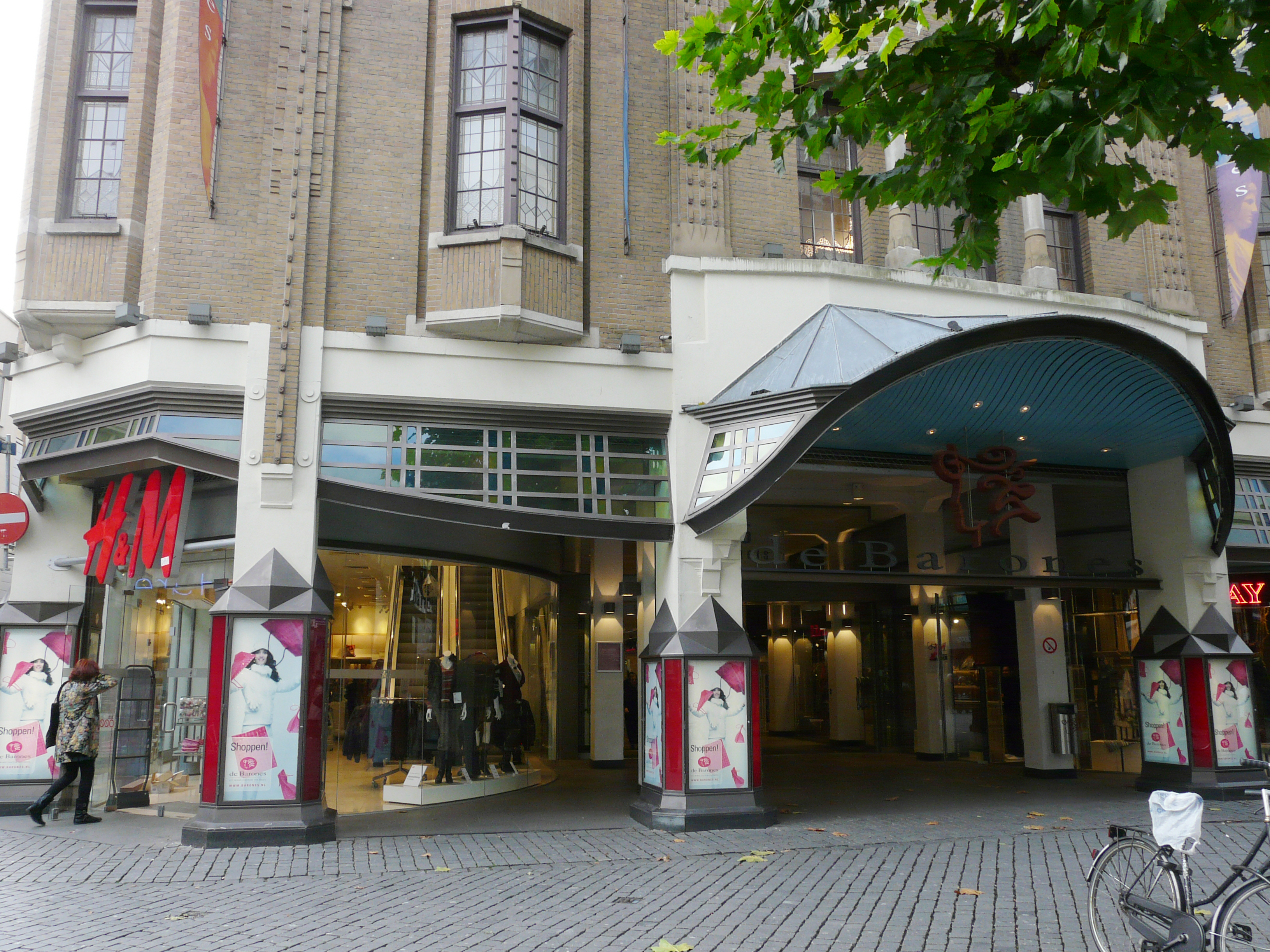 Ingang winkelcentrum de Barones in Breda Centrum in Breda